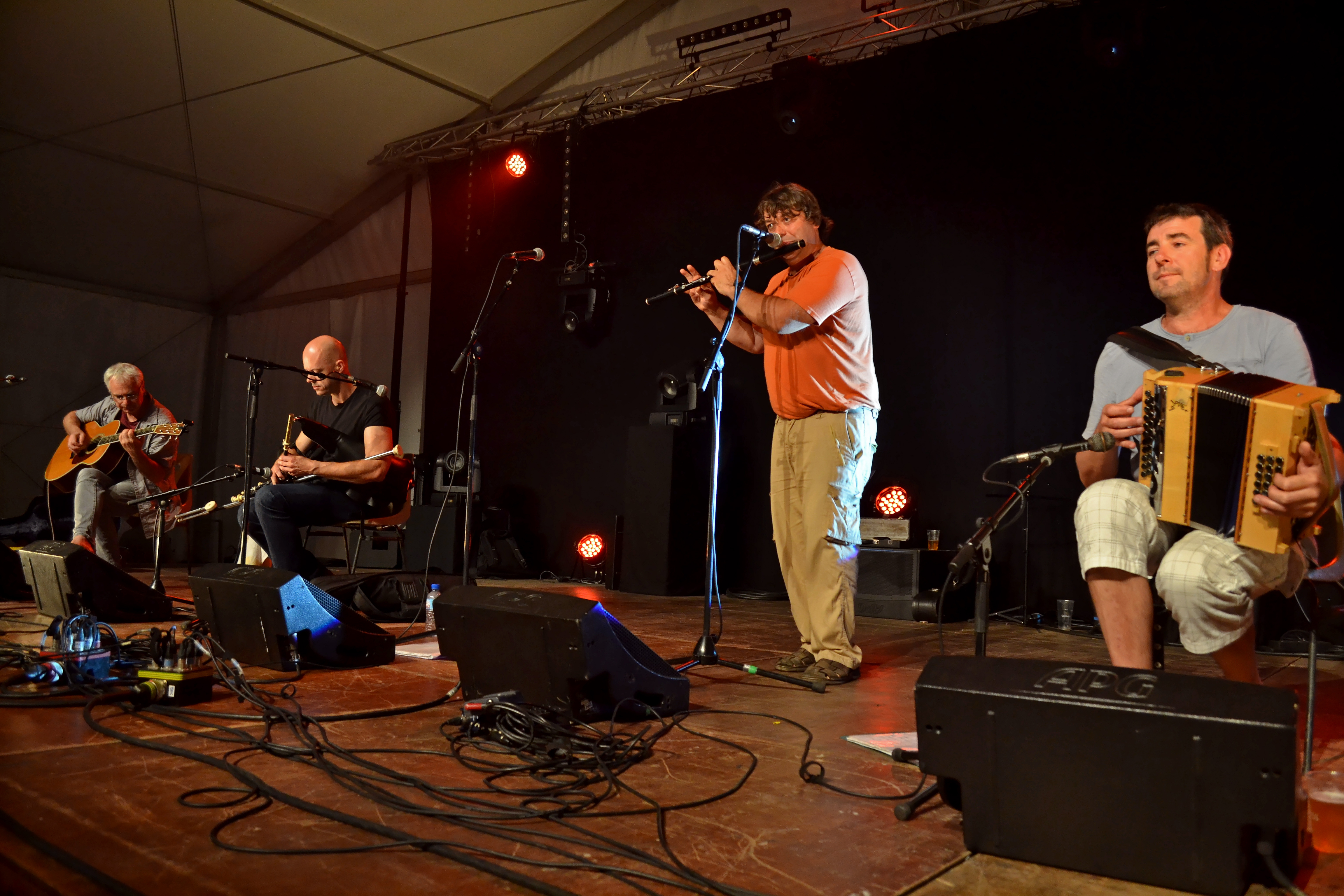 Carré Manchot en fest-noz à l'espace Saint-Corentin lors du festival de Cornouaille le 25 juillet 2014.